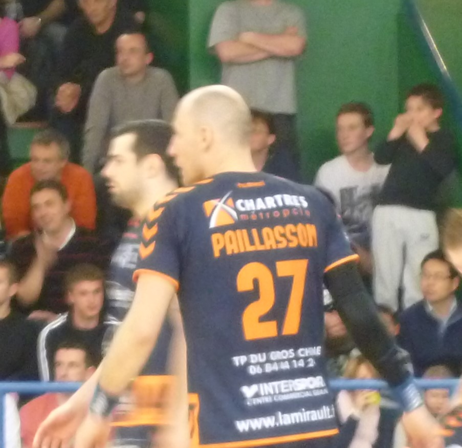 Emeric Paillasson